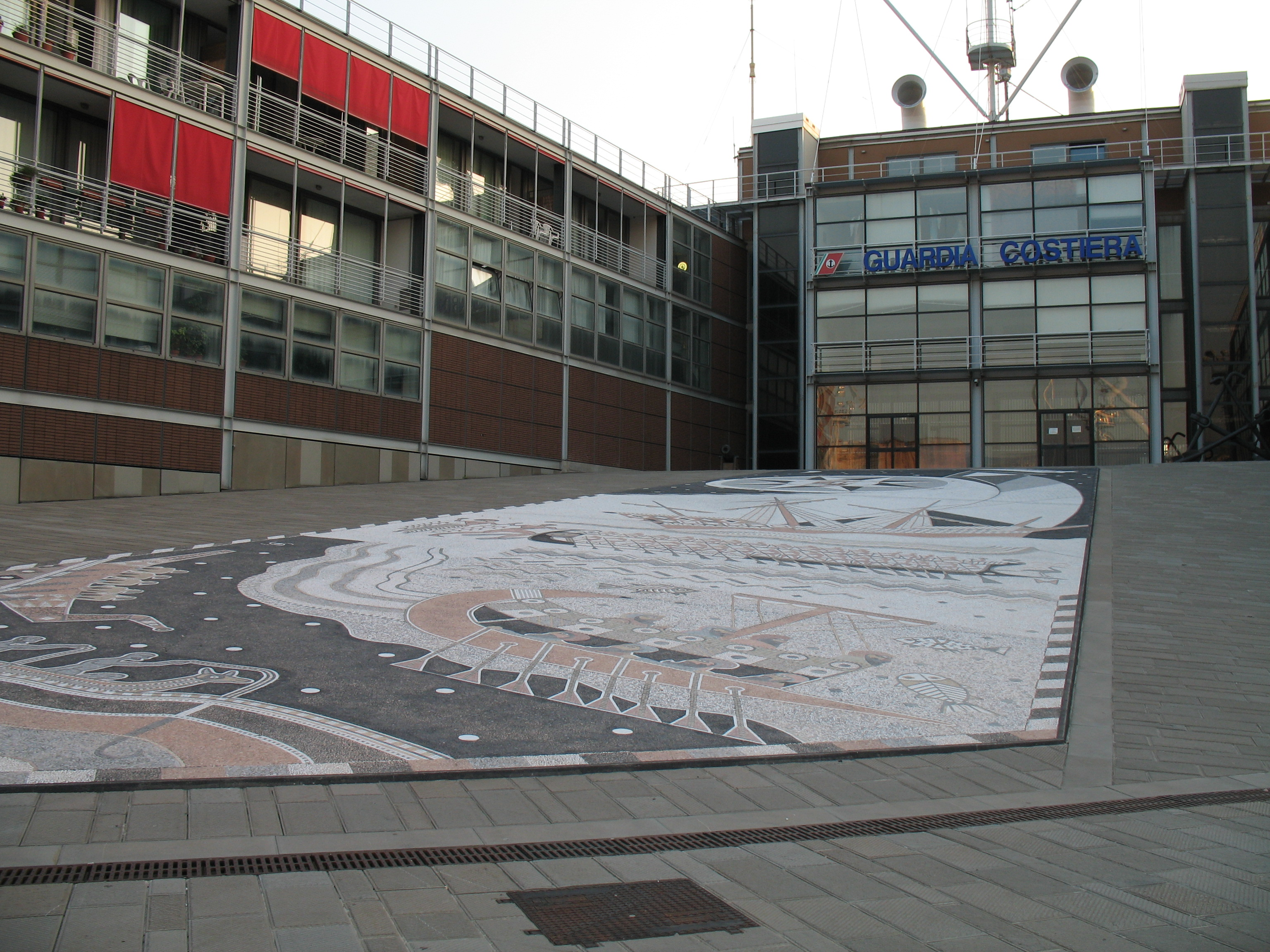 Genova - porto antico Porto antico - Sede Guardia Costiera